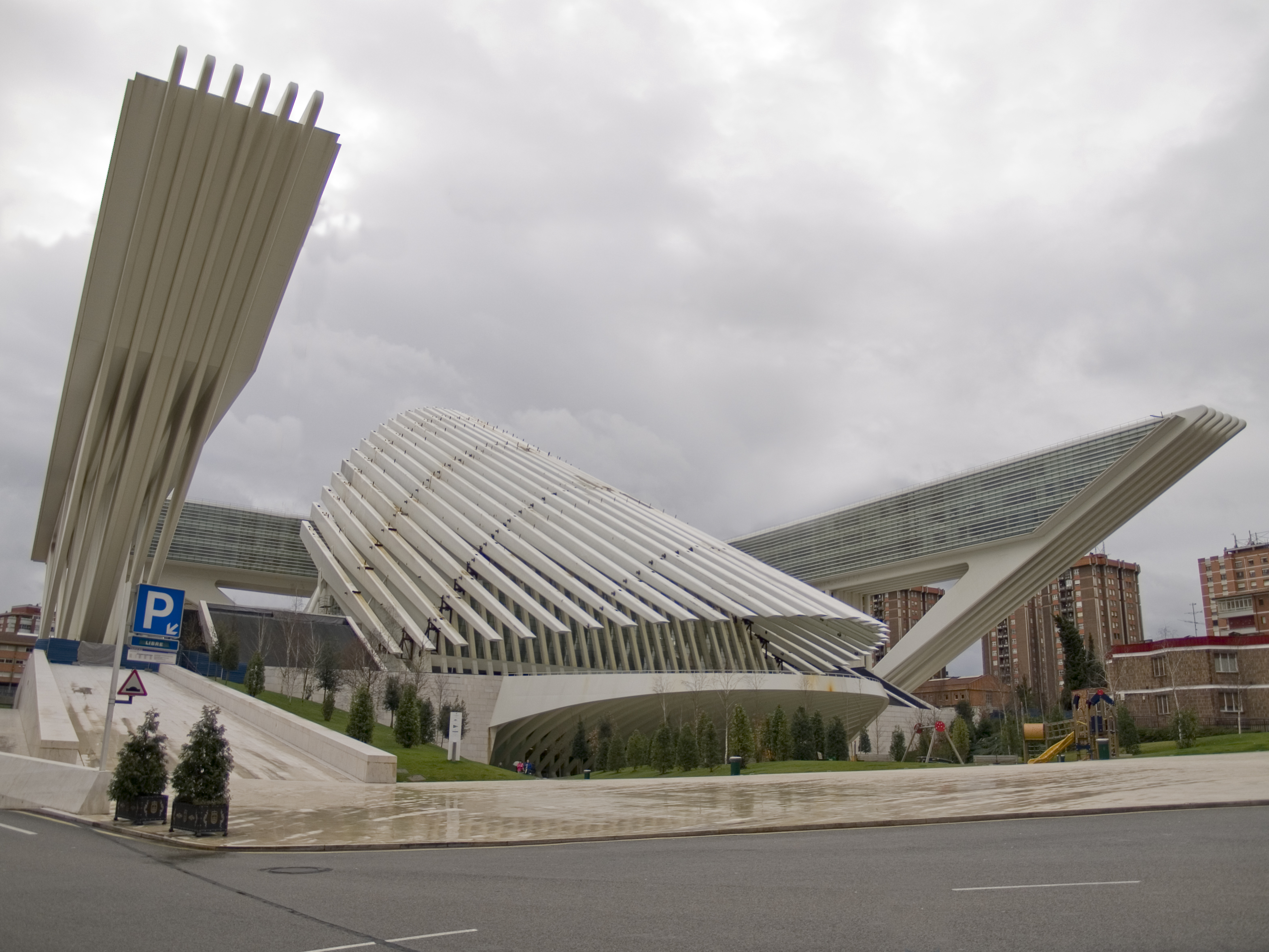 Palacio de Congresos Princesa Letizia de la ciudad de Oviedo (Asturias, España). Está diseñado por el arquitecto valenciano Santiago Calatrava.